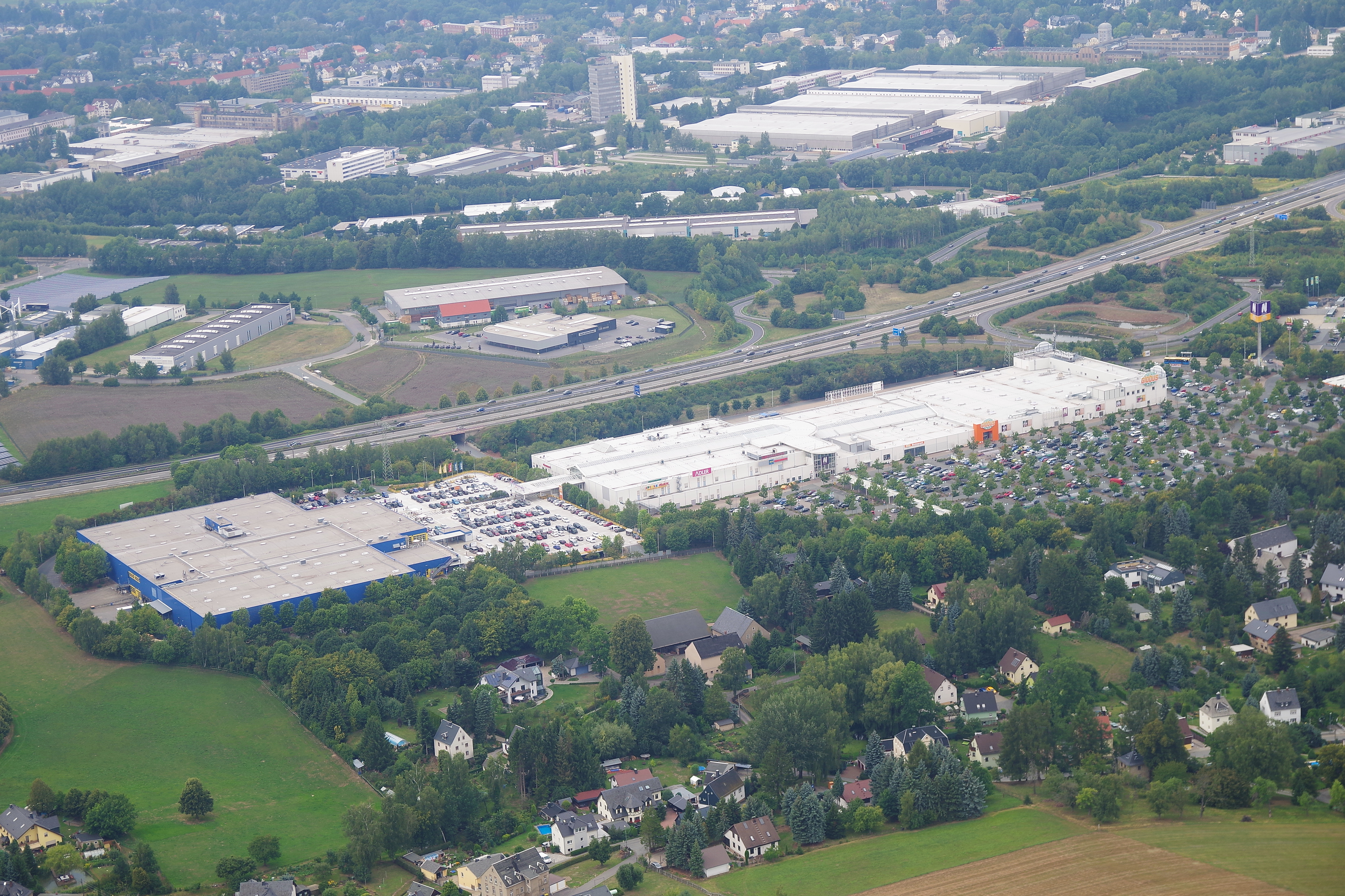 Chemnitzer EKZ Neefepark an der A72